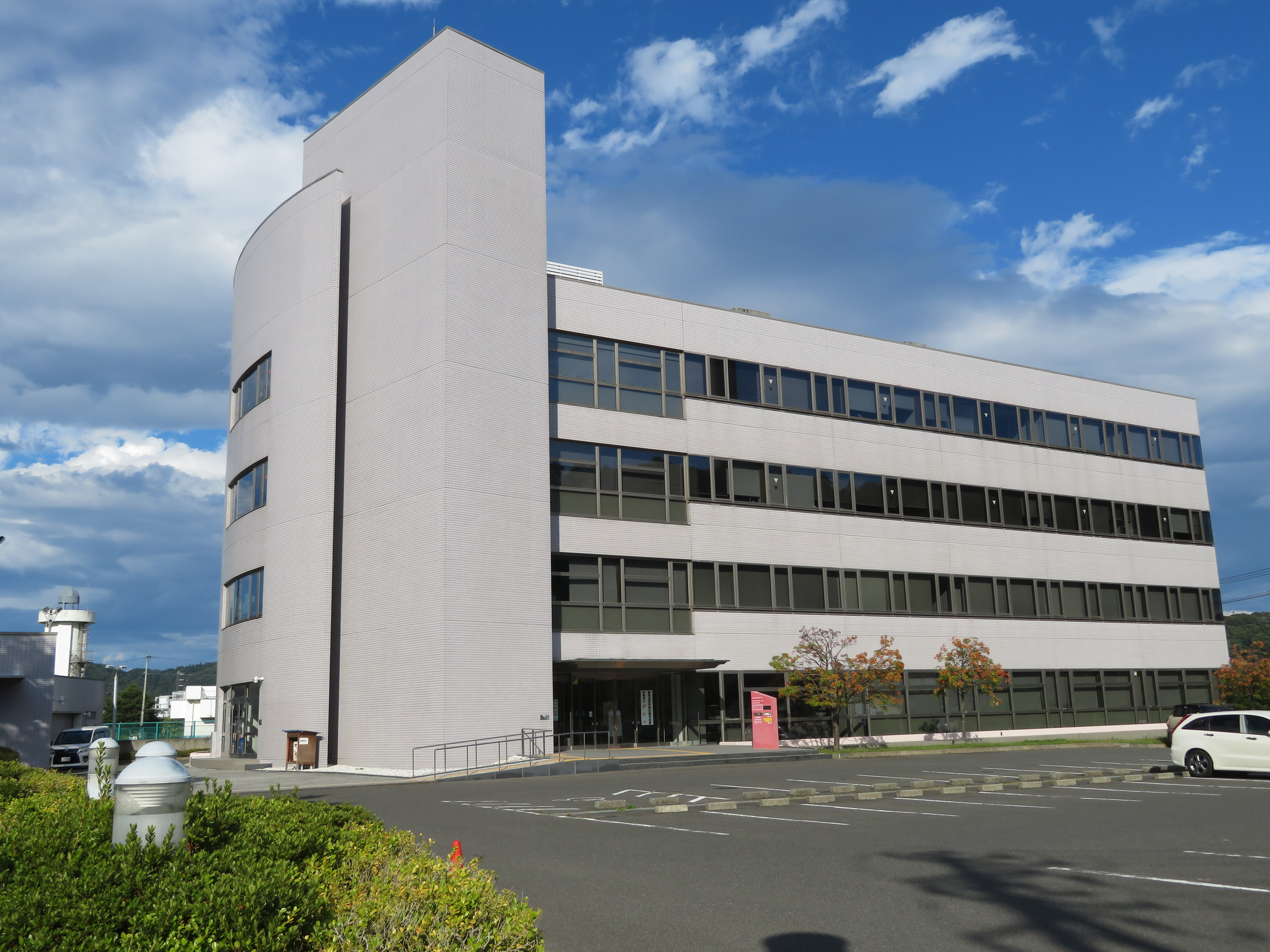 岩手県宮古市に所在する宮古合同庁舎（国の出先機関の合同庁舎）